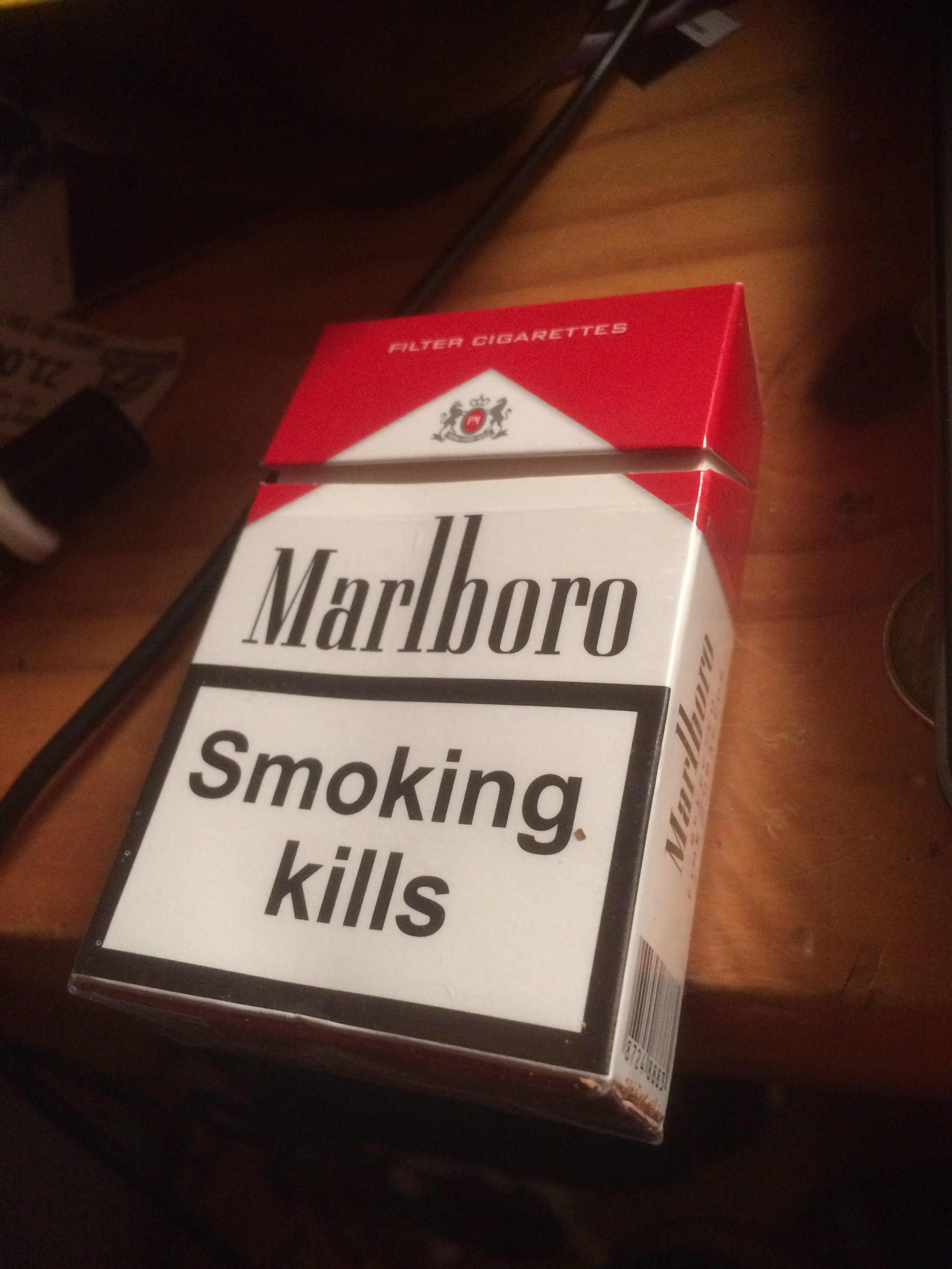 THE Old European pack of Marlboro reds used till end 2014